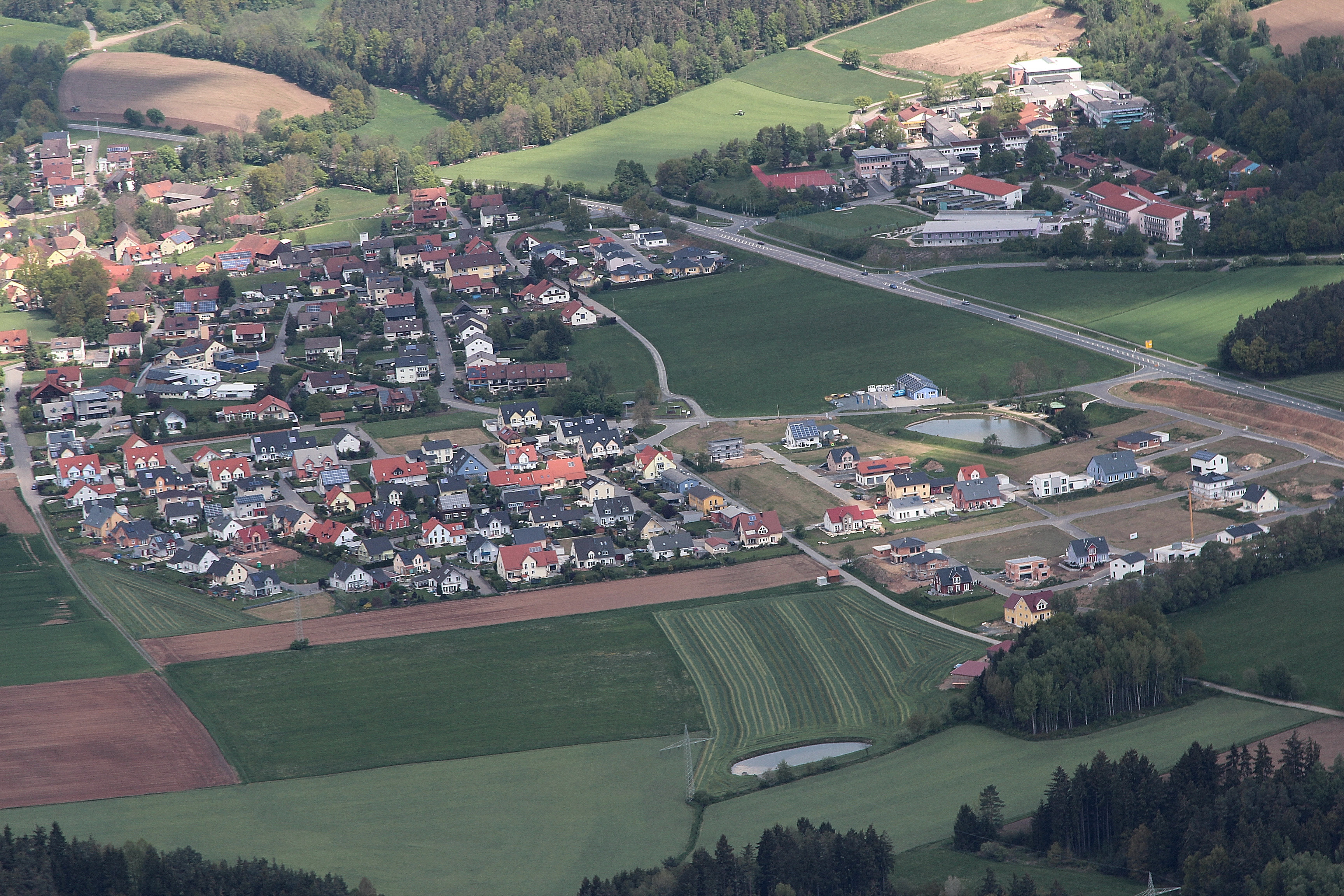 Irchenrieth, Landkreis Neustadt an der Waldnaab, Oberpfalz, Bayern